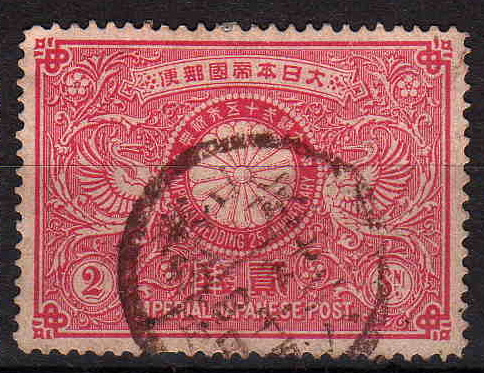 japanese stamp（日本の記念切手）明治天皇御夫妻の銀婚式を記念した切手である。